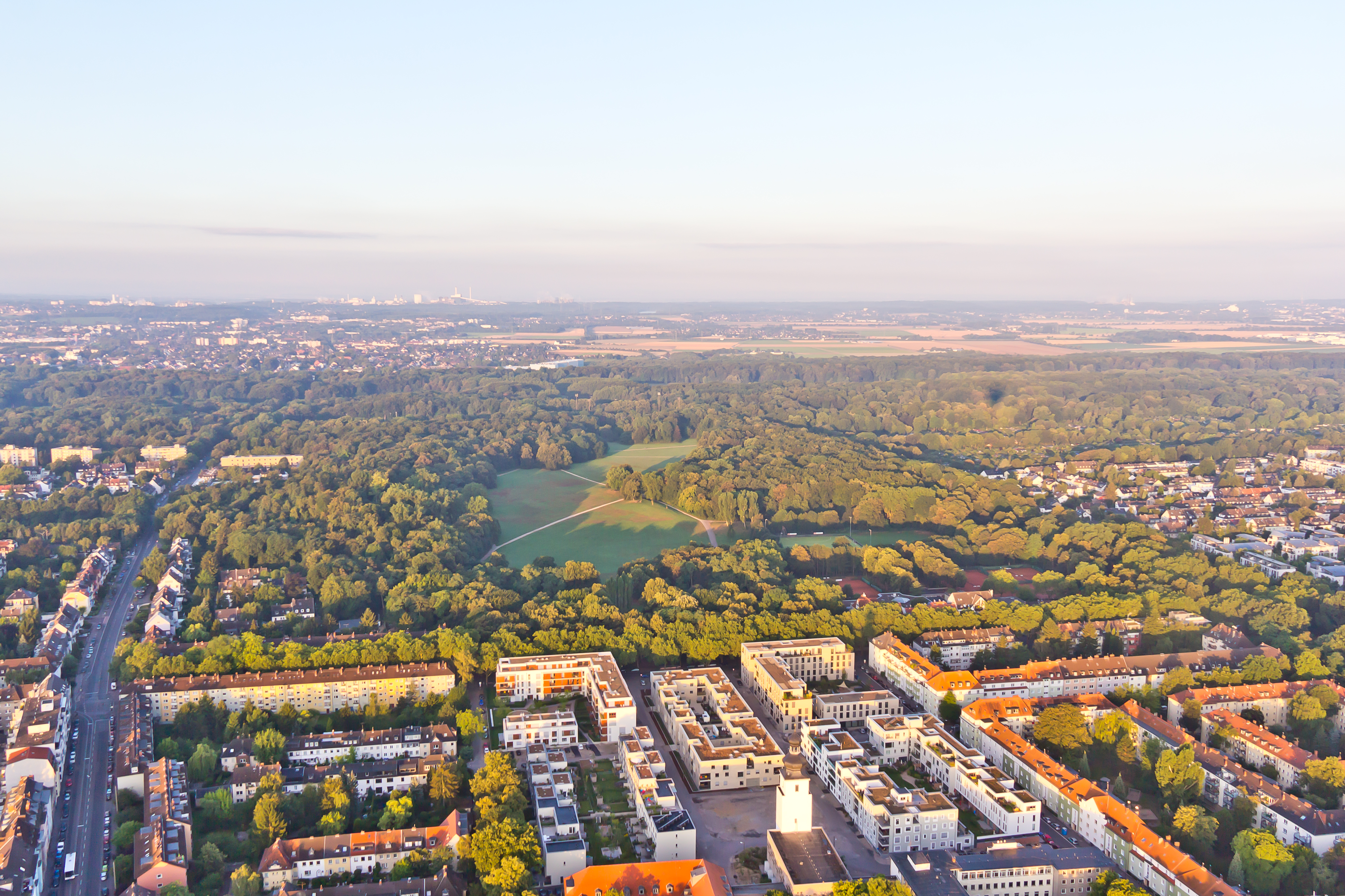 Ballonfahrt über Köln - Kirche Zur Heiligen Familie, Wohnbebauung Il Castello, Beethovenpark